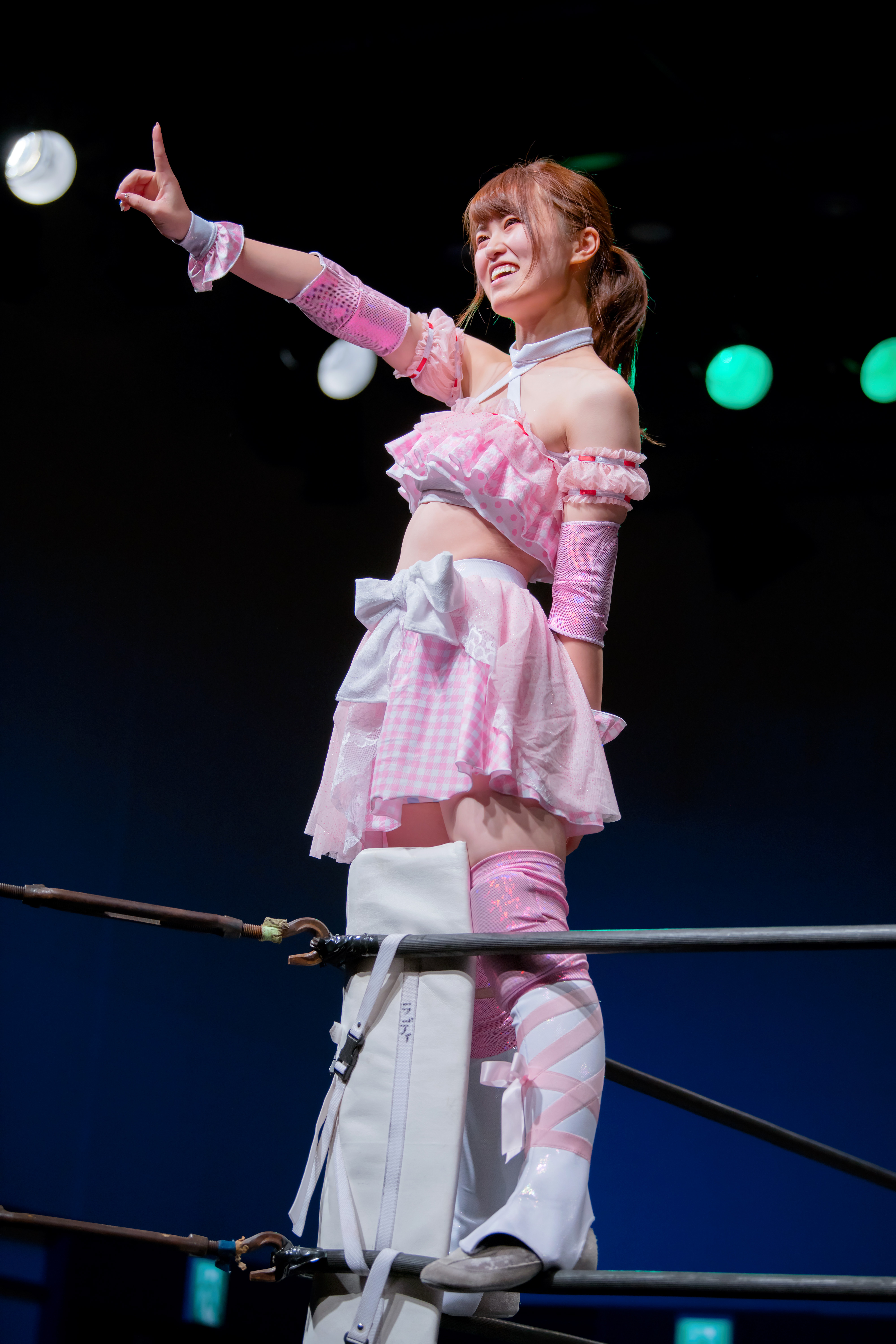 入江彩乃デビュー戦（2018年10月28日 両国KFCホール）